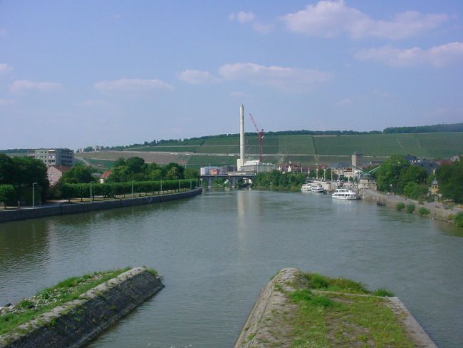 Blick flussabwärts von der Alten Mainbrücke in Würzburg (August 2004) Das Foto wird mit Genehmigung von Weberberg.de, Website für Biberach veröffentlicht. Fotograf: The weaver 12:29, 5. Aug 2004 (CEST)